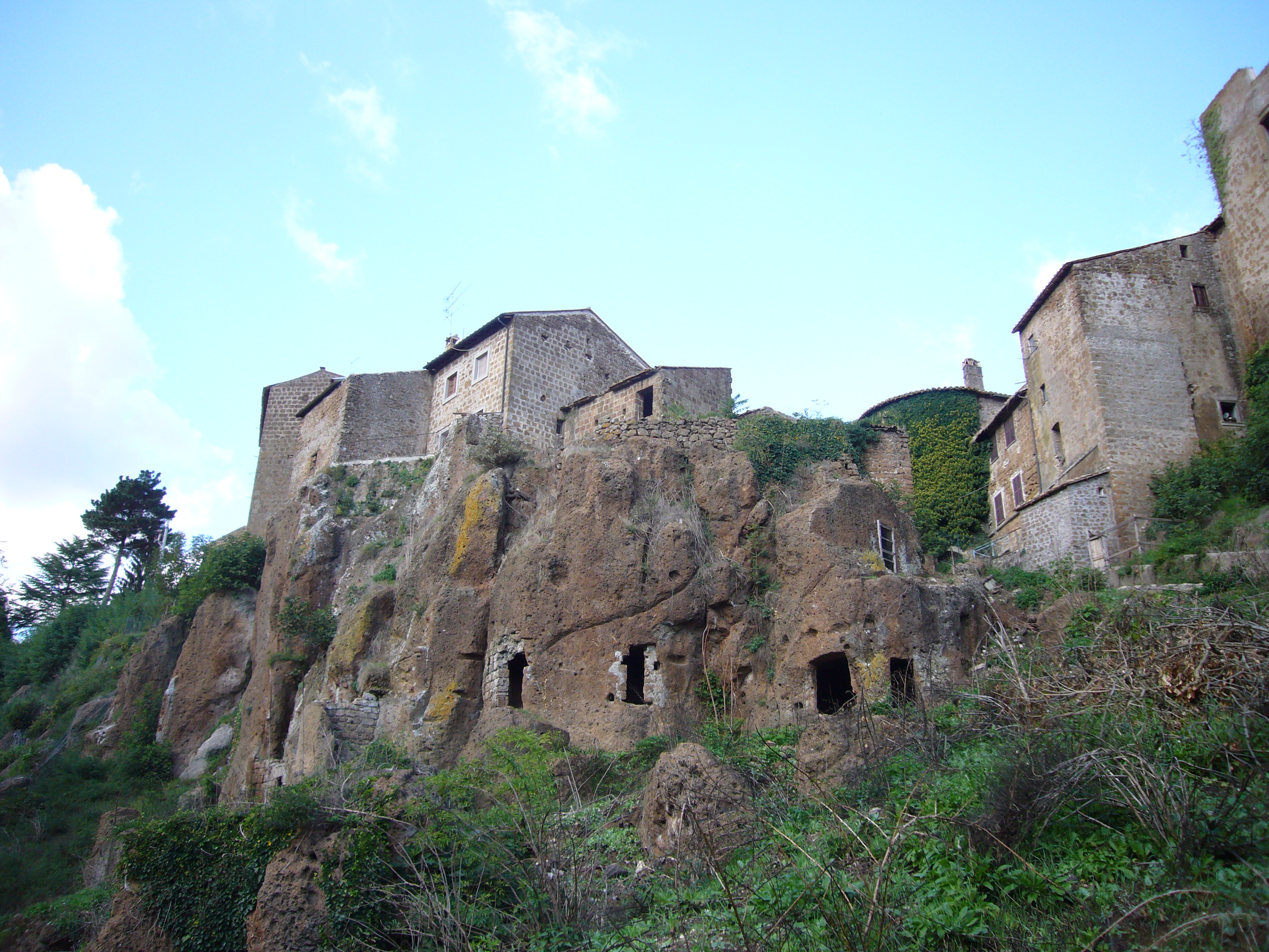 Vejano, il borgo abbandonato